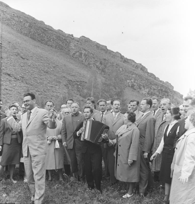 Zentralbild/Junge, 8.6.1964 Staatsbesuch Walter Ulbrichts in der Sowjetunion Irkutsk: Aufenthalt am Baikalsee Nach einer Motorbootsfahrt mit dem Mortorschiff "Irkutsk" am dem Baikalsee unternehmen Walter Ulbricht, Erster Sekretär des ZK der SED und Vorsitzender des Staatsrats der DDR, und seine Begleitung eine Spaziergang. UBz: Eine Harmonika war schnell zur Hand, und gemeinsam werden deutsche und sowjetische Arbeiterlieder gesungen. Mitte, rechts: Else Merke, Mitglied des Staatsrats; Links und rechts hinter ihr: Hans Rietz und Manfred Gerlach. Links vom Hormonikaspieler: Erich Mielke; ganz rechts: Ewald Eitge.